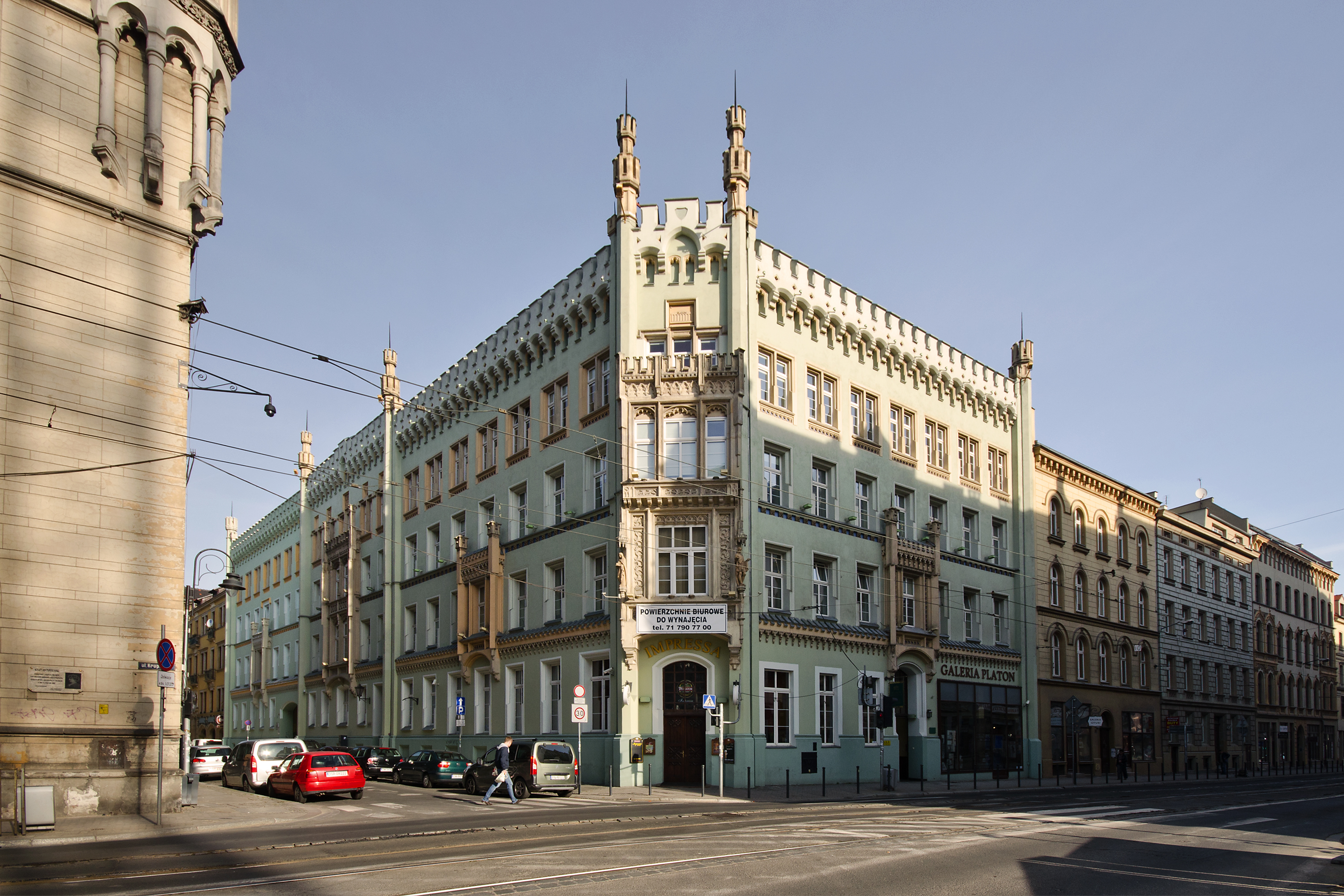 Kamienice Krupnicza 13, Miasto Wrocław - Stare Miasto